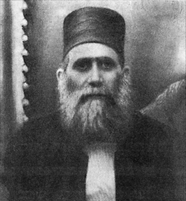 הרב אפרים הכהן בצעירותו